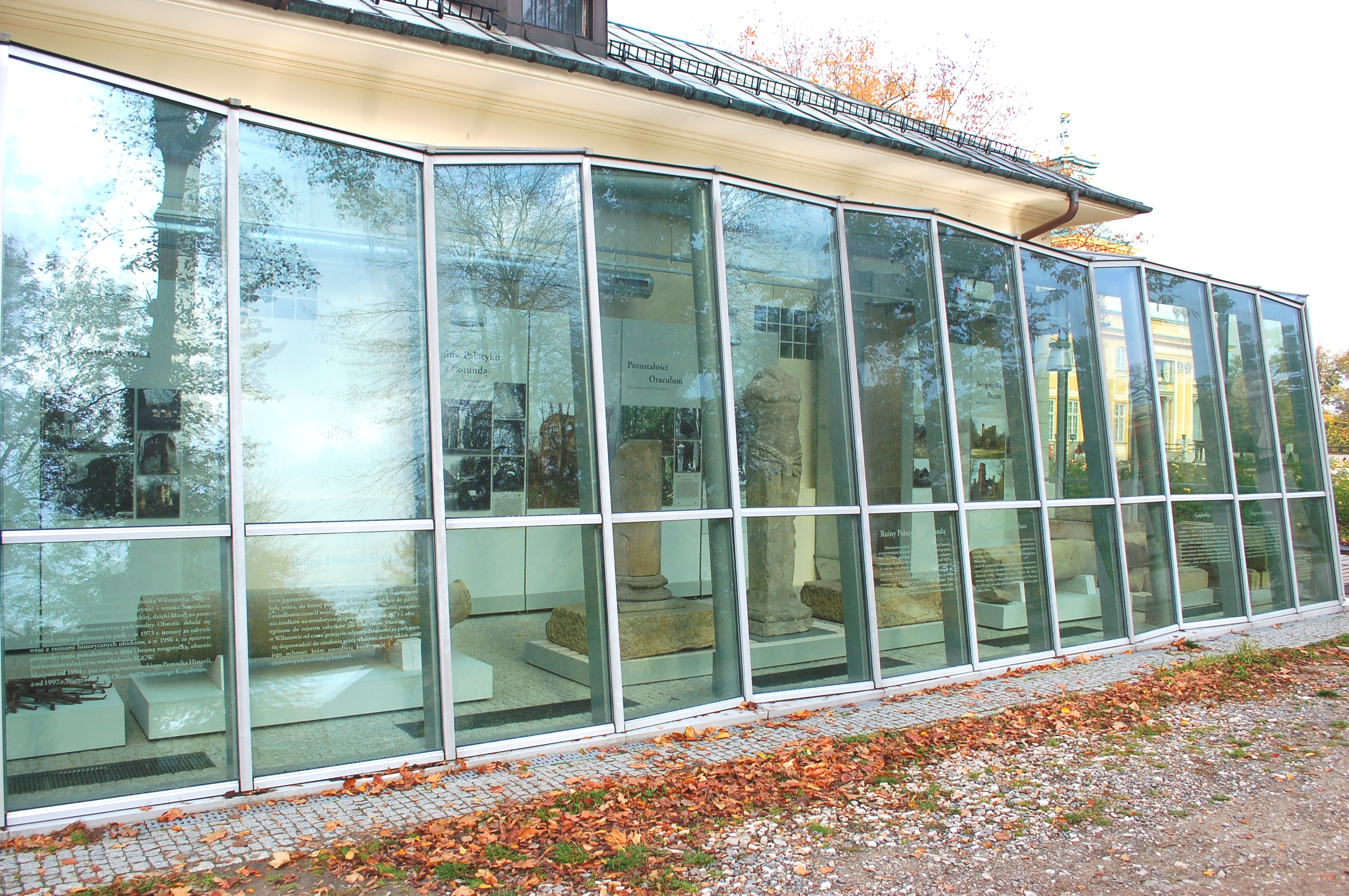 Wilanów